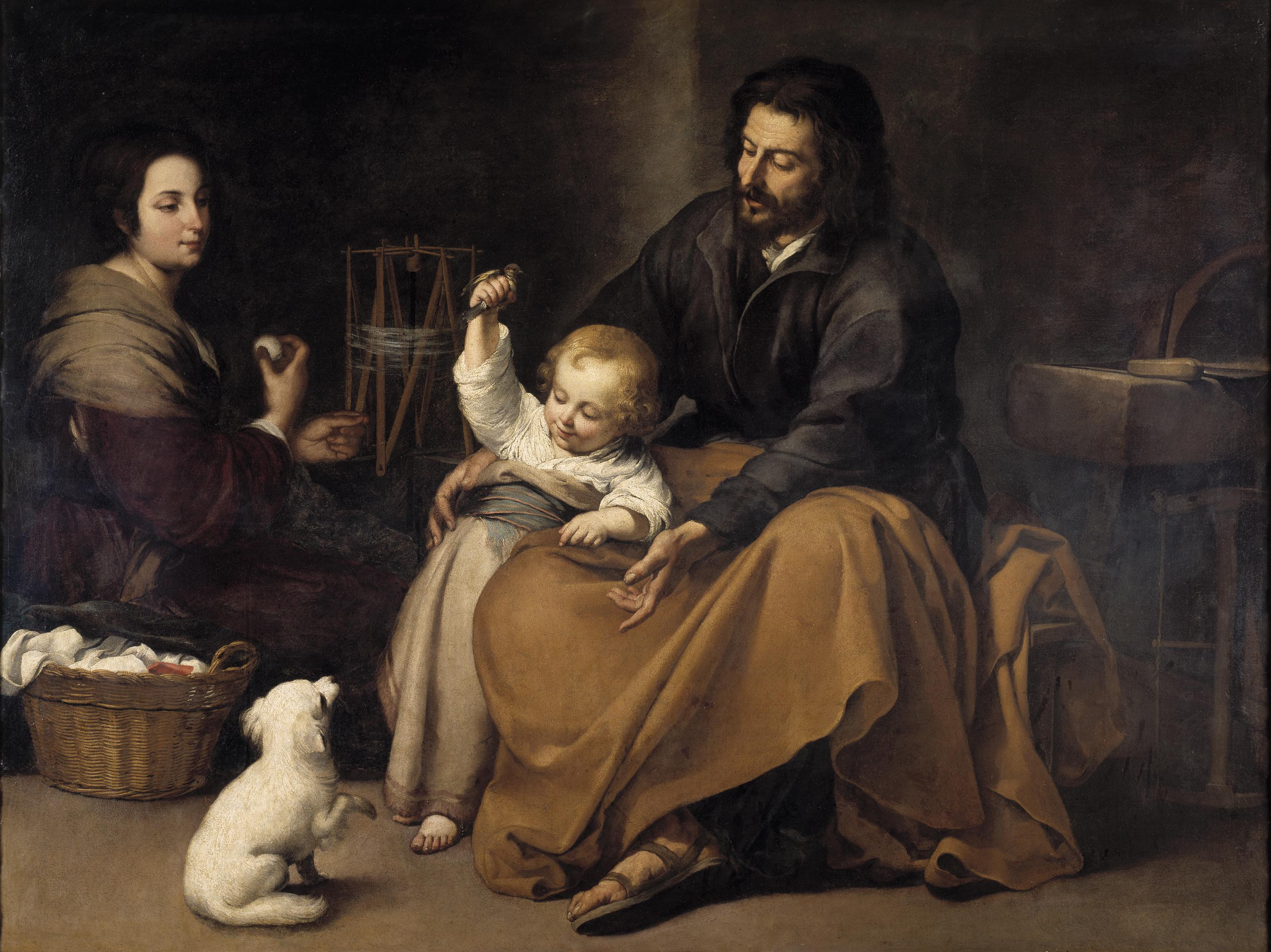 La obra representa a los tres miembros de la Sagrada Familia cristiana.